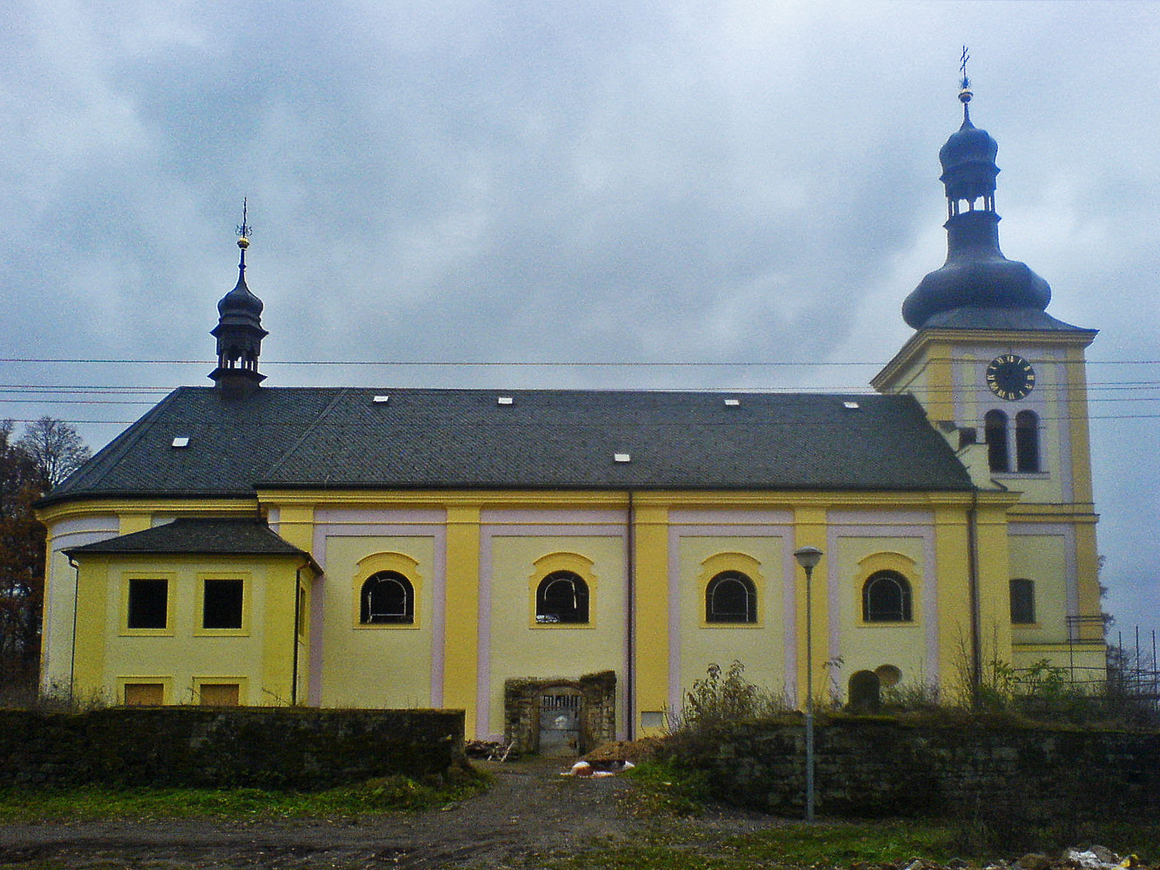 Kostel svatého Martina, Markvartice (okres Děčín).